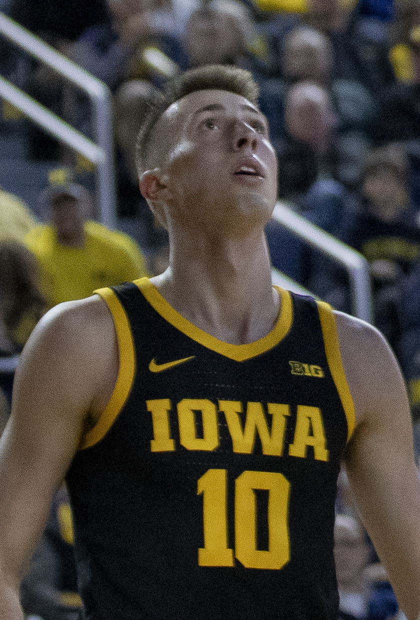 _O6A2494